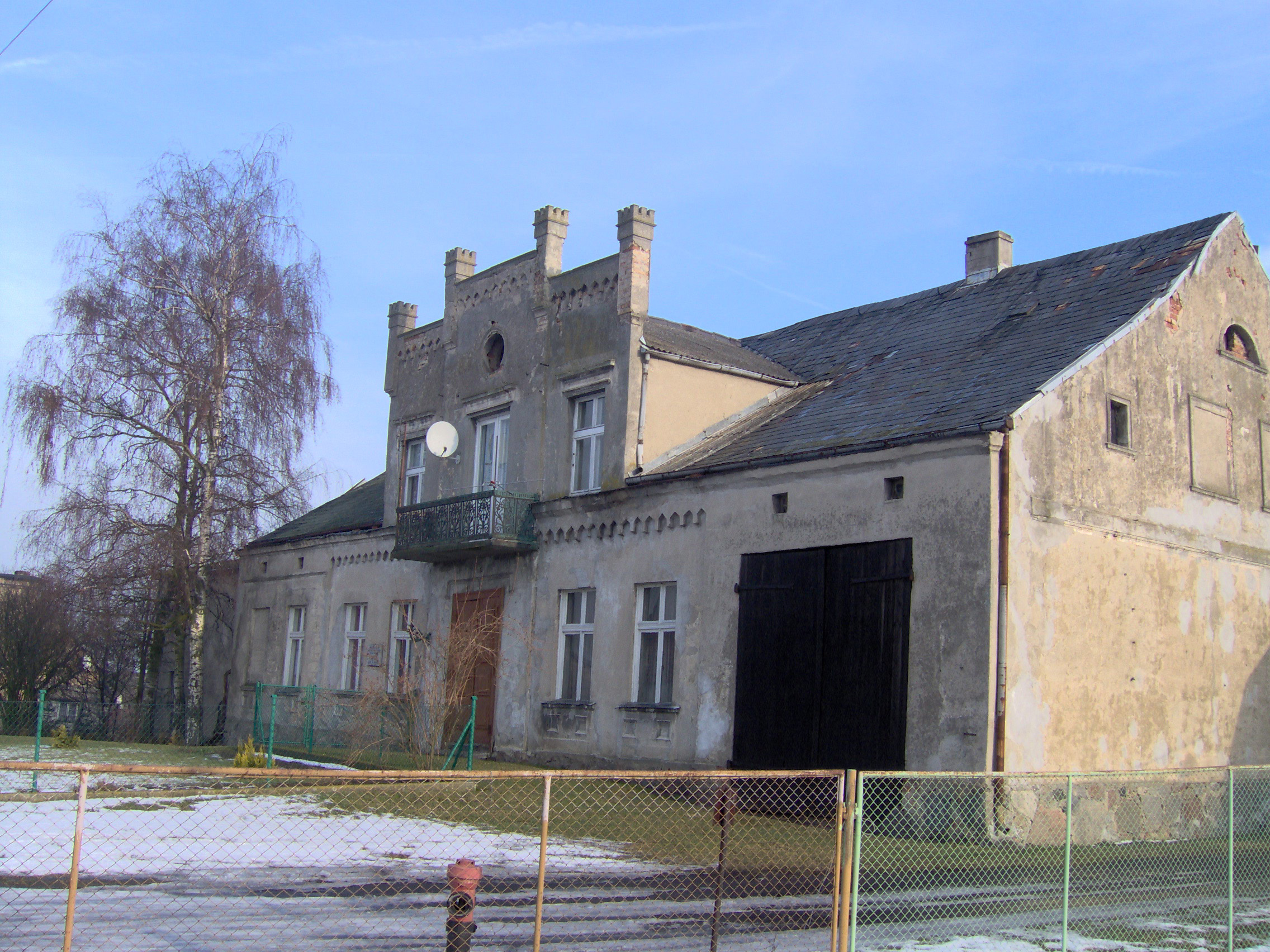 Manor hause in Dorposz Szlachecki